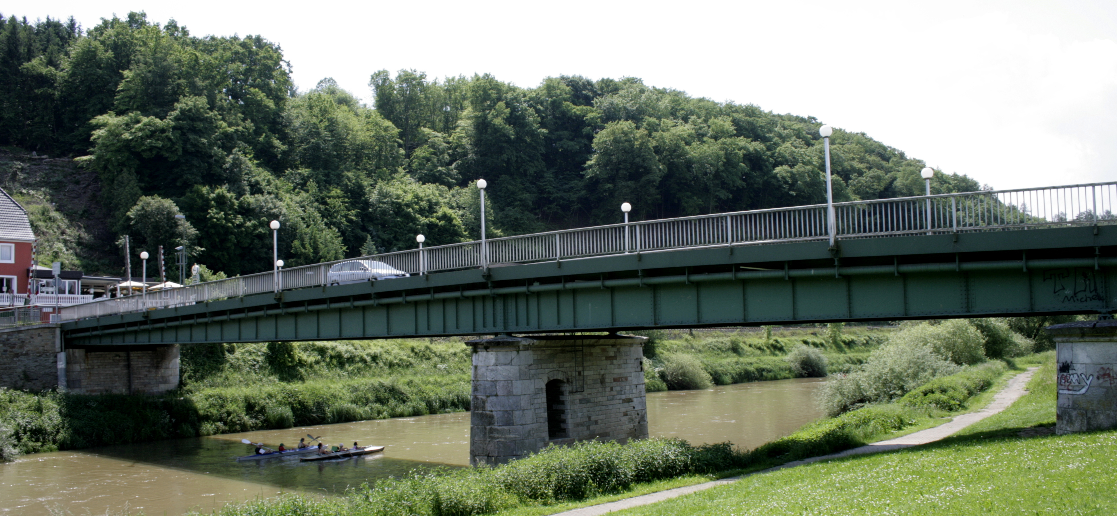 Brücke über die Lahn in Aumenau, Deutschland